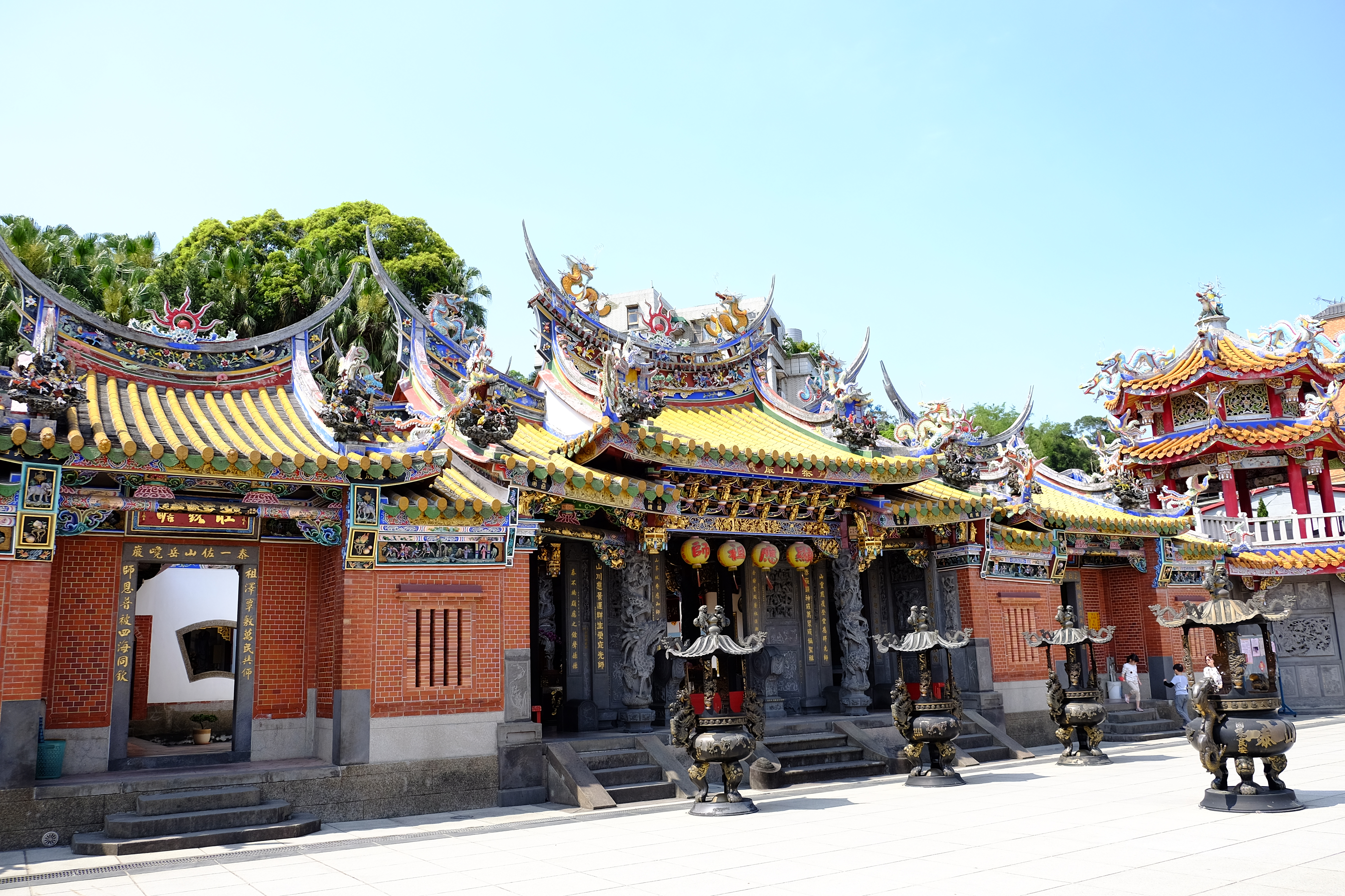 Upper Taishan Temple 2018 頂泰山巖